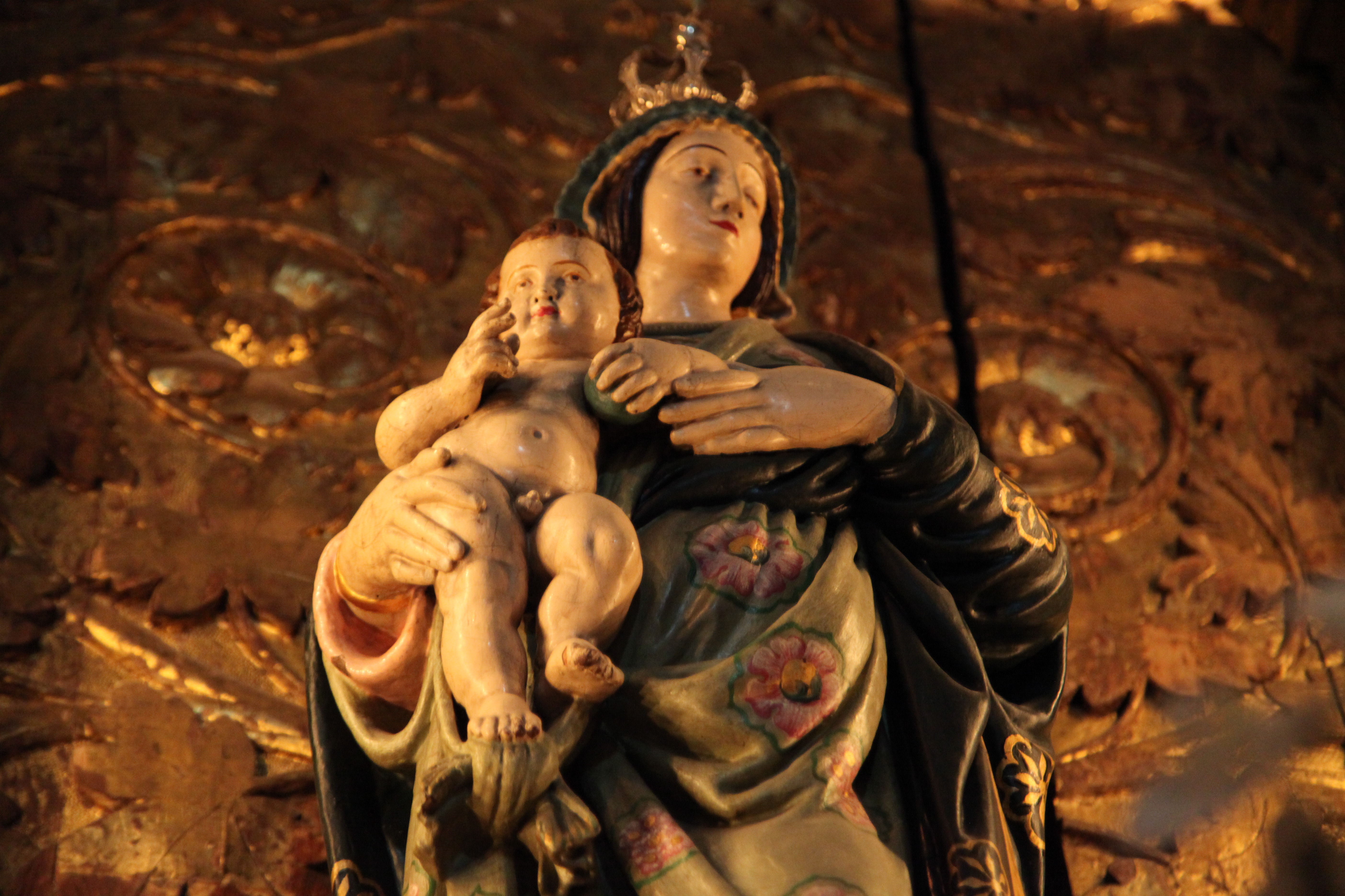 Lisbonne